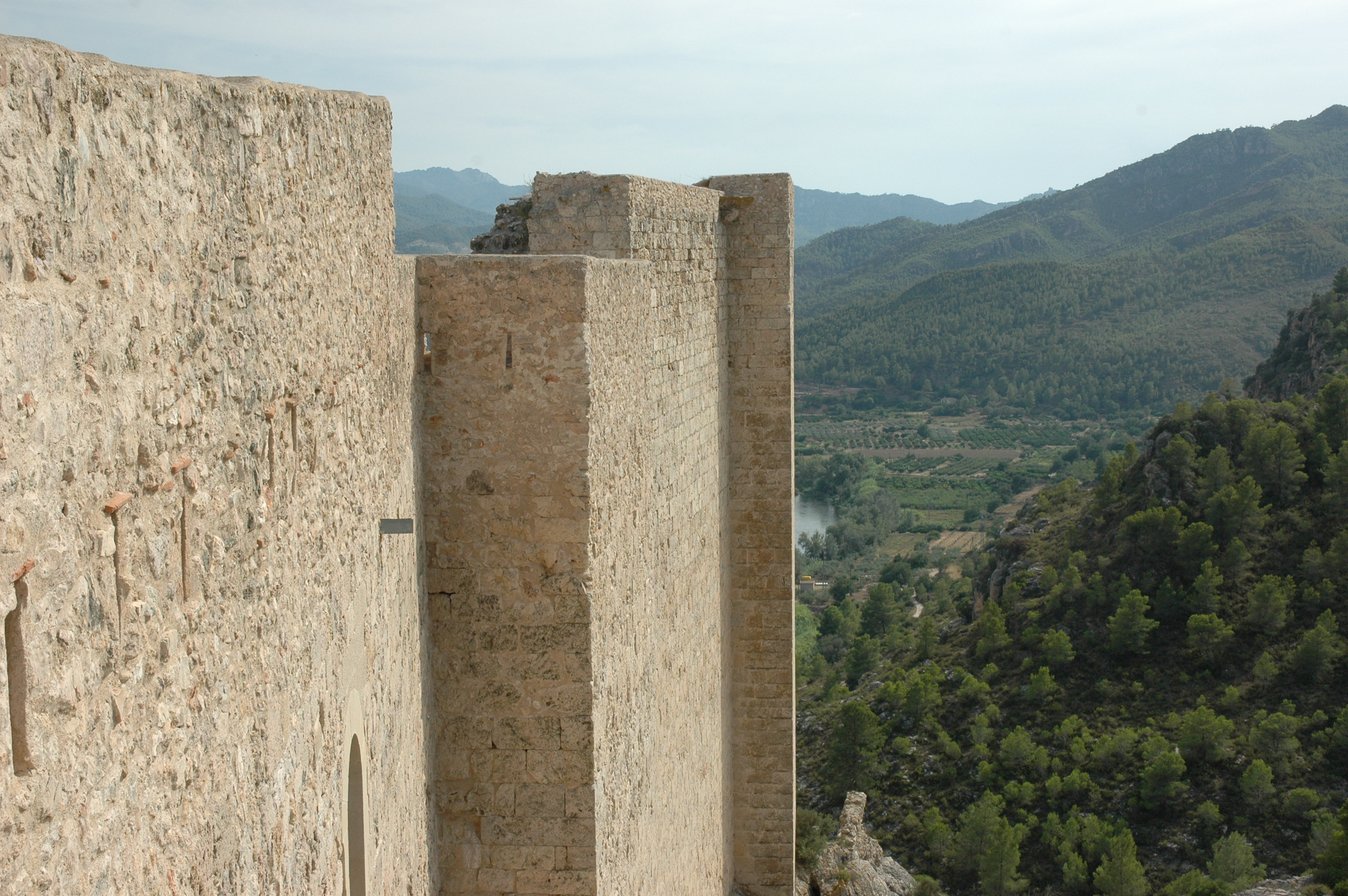 Castell de Miravet - General